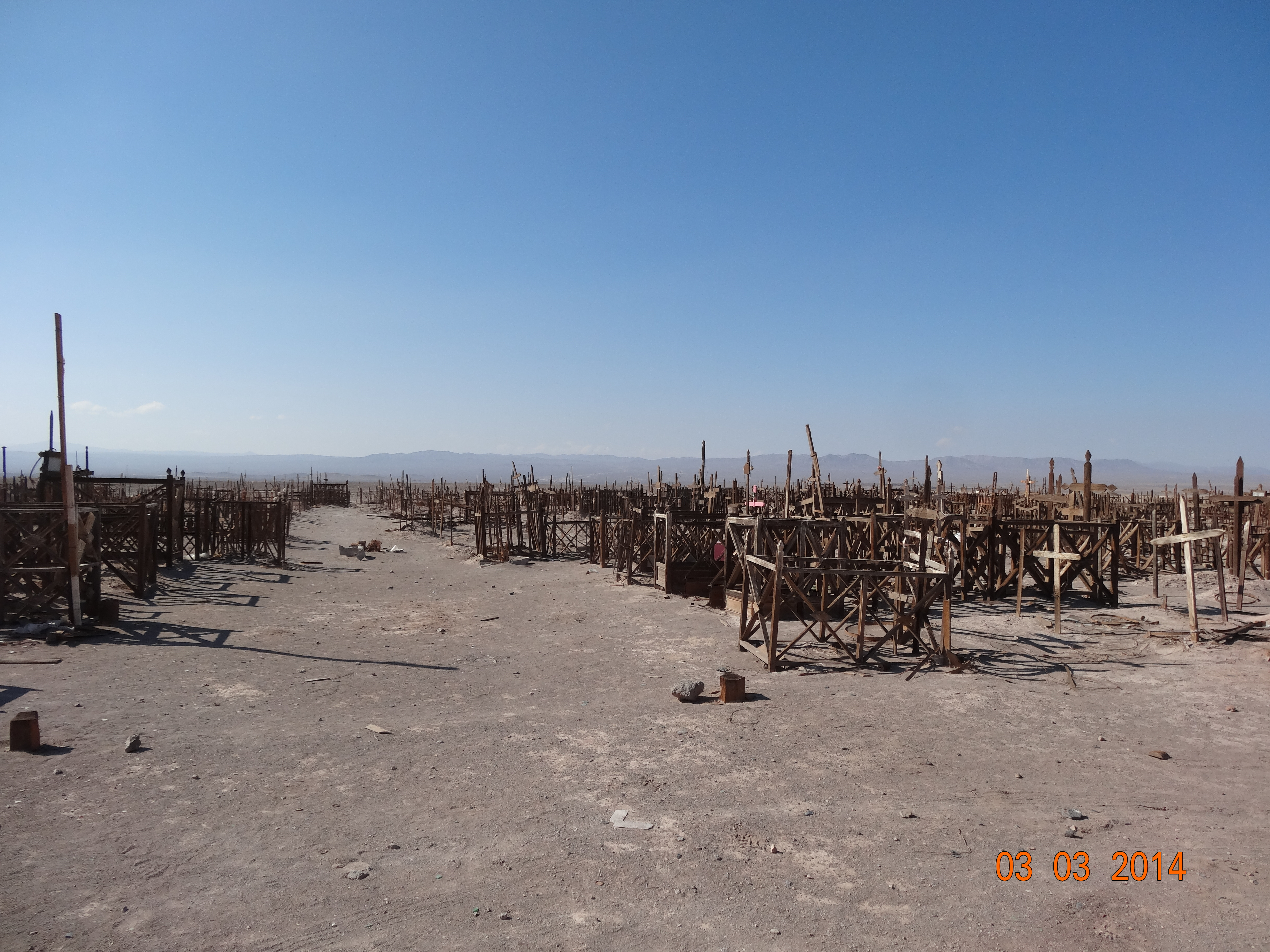 Vista del cementerio de los apestados, Sierra Gorda, Chile